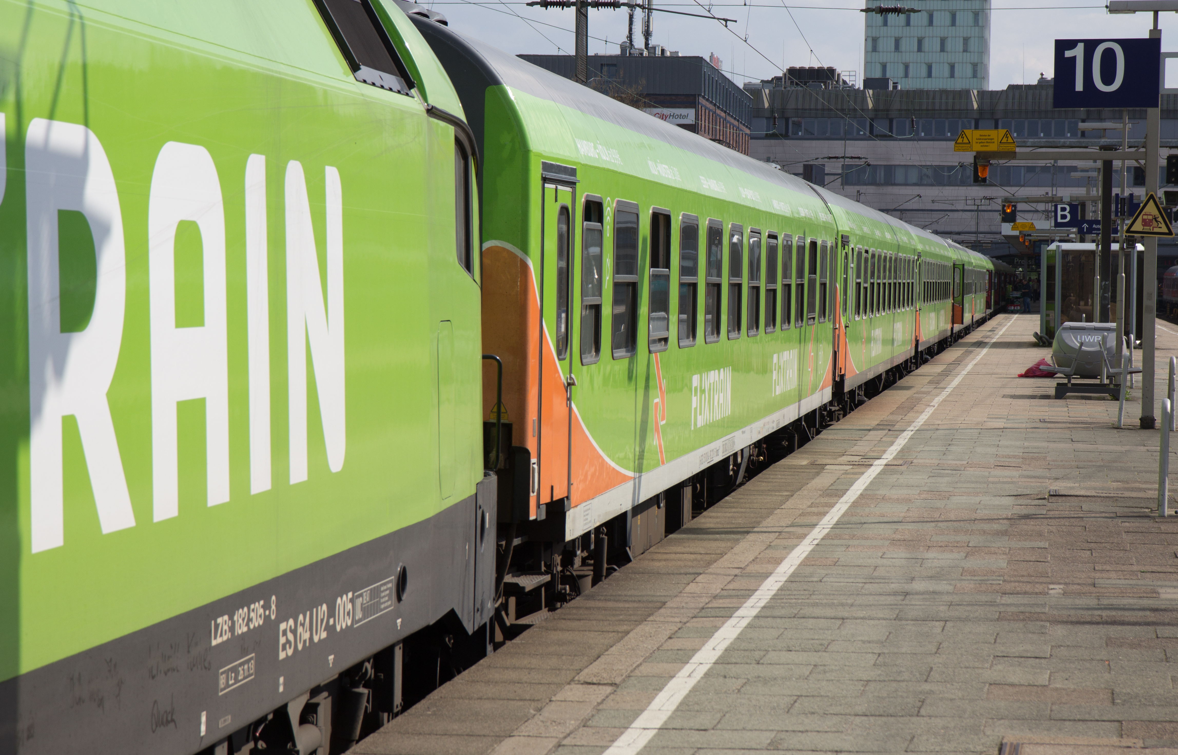 Flixtrain der Flixmobility im Bahnhof Hamburg Altona und auf der Fahrt bis Hamburg Haptbahnhof. Fotoarbeiten mit Akkreditierung der Pressestelle.